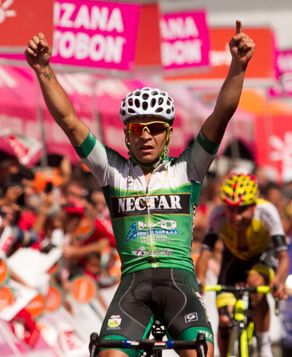 Eta.9 Clásico RCN 2015 Sábado 3 de octubre de 2015. Buga - Ibagué (195Kms)